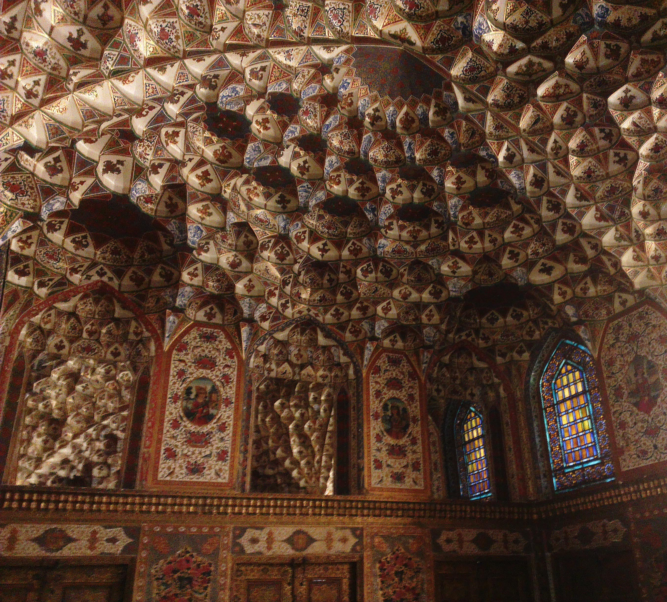 مقرنس کاری فضای شاه نشین مجموعه خانه خان واقع در منطقه خوراسگان شهر اصفهان